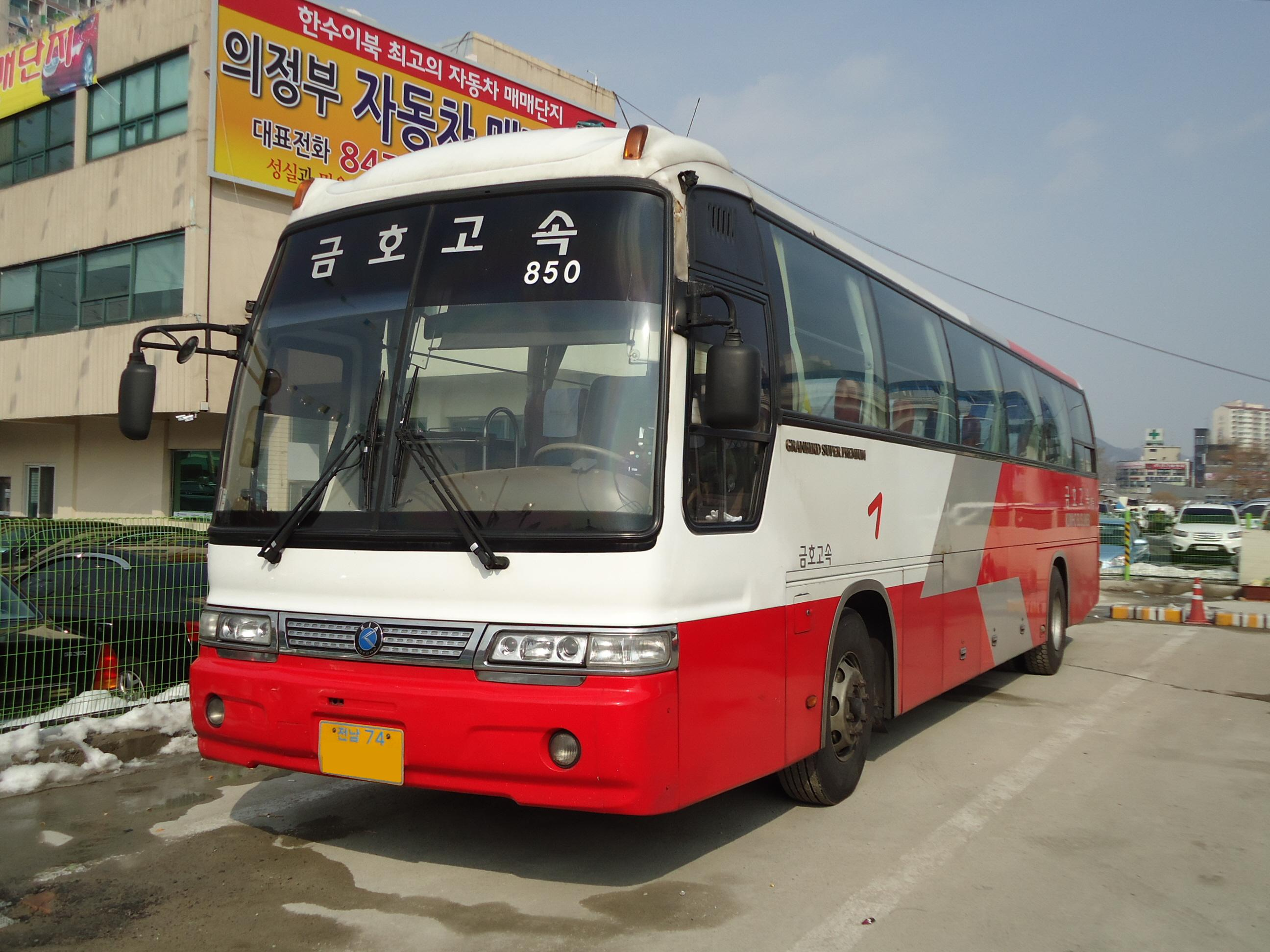 금호고속 그랜버드 슈퍼프리미엄 선샤인(의정부-광주)